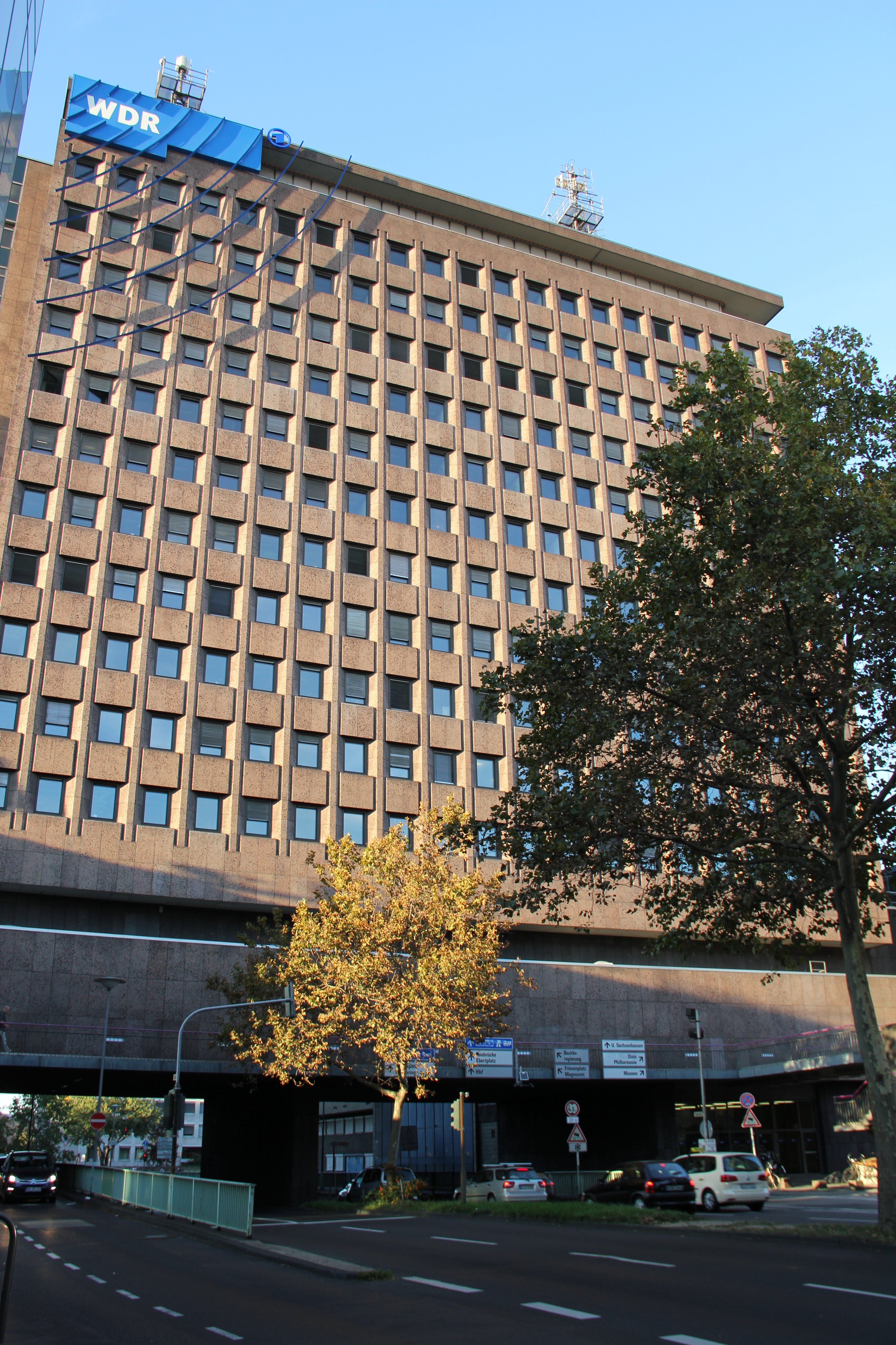 Errichtet: zwei Bauabschnitte 1948-52/1953-54 Funkhaus des Westdeutschen Rundfunks Köln WDR (bis Ende 1955 Nord-Westdeutscher Rundfunk NWDR) Architekt: Peter Friedrich Schneider (1901-1981)